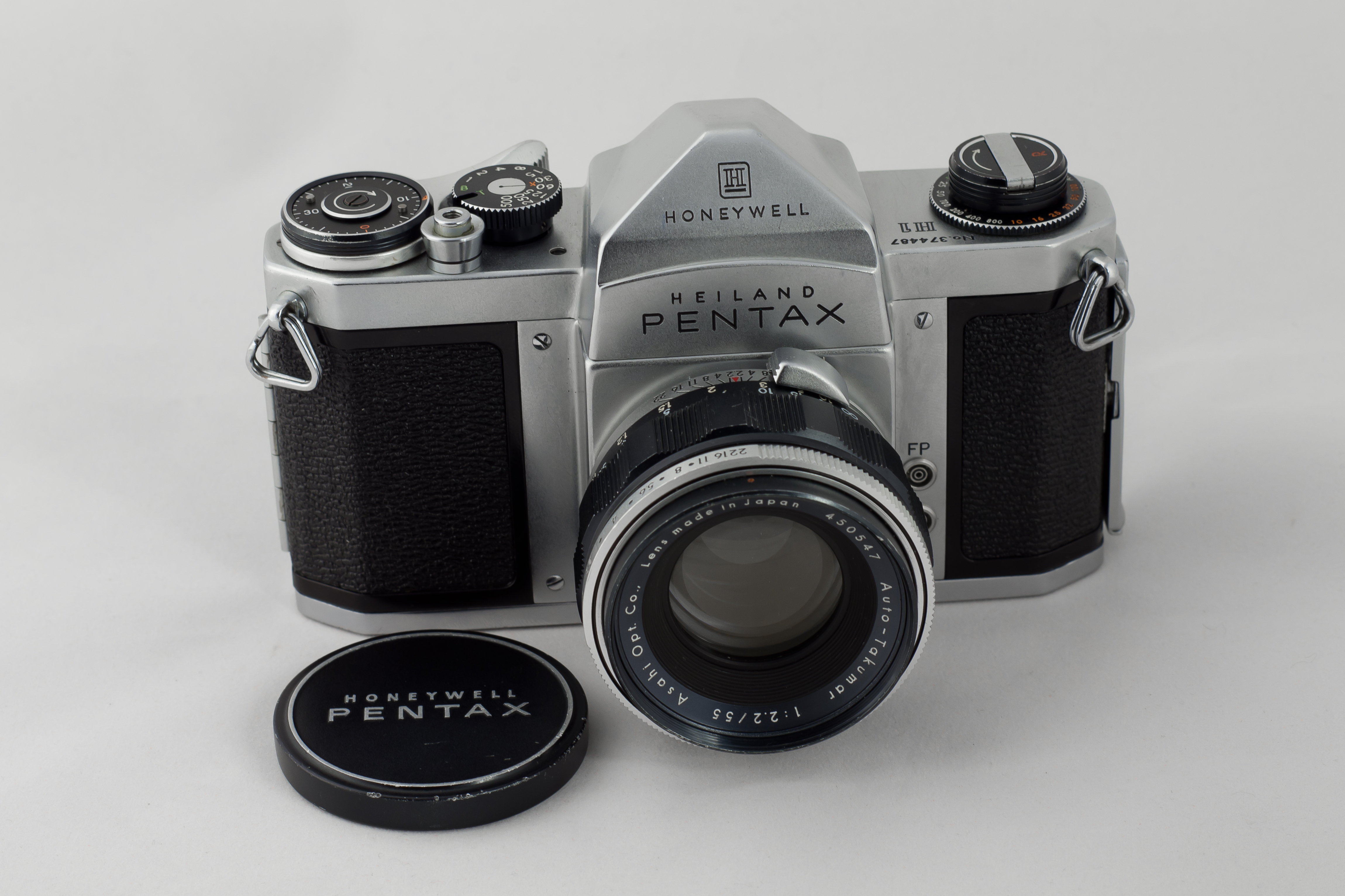 Общий вид Heiland Pentax S1